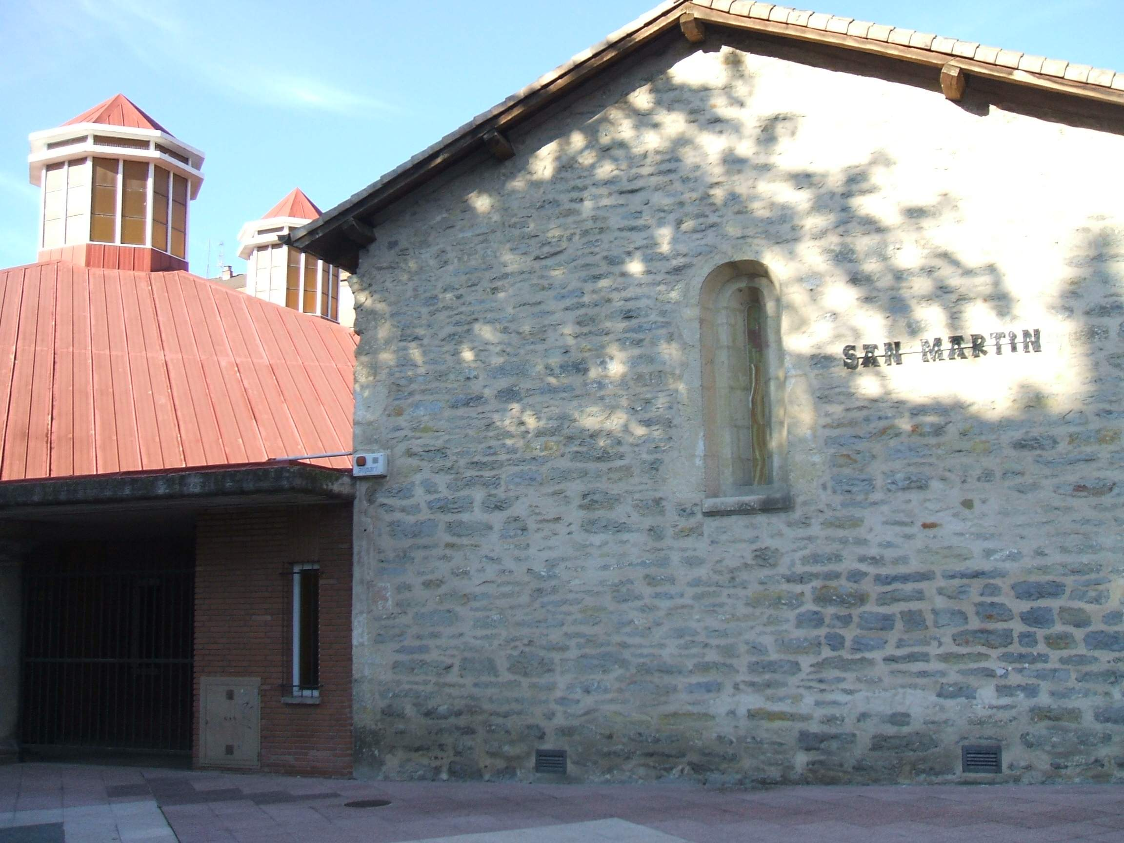 Iglesia de San Martín (Vitoria)